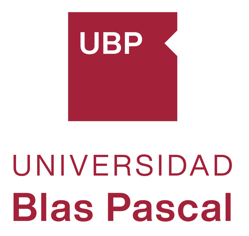 Derechos: Universidad Blas Pascal